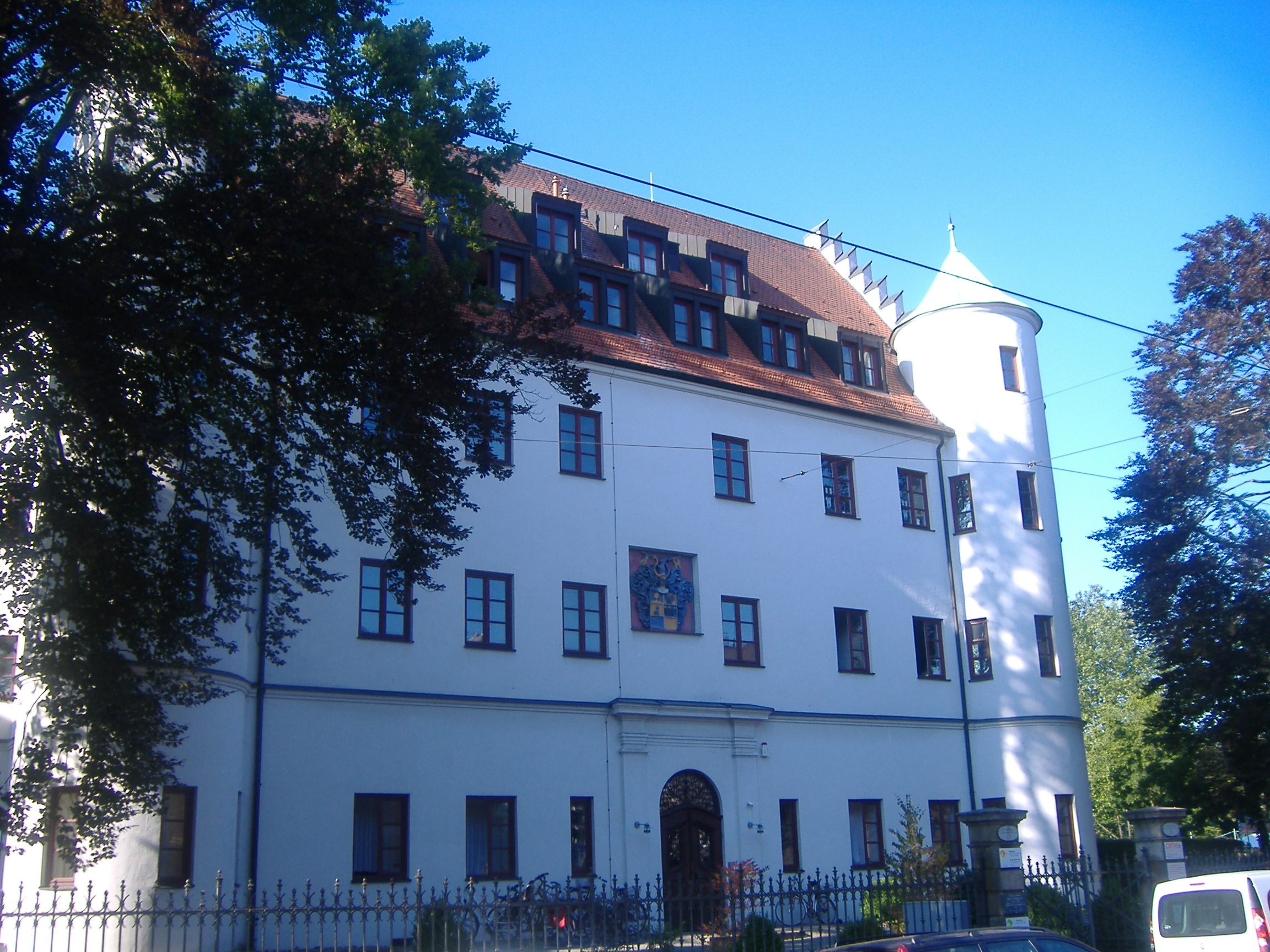 Vorderfront des Schlosses